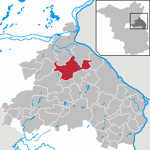 Wriezen in Brandenburg (Country) - District Märkisch-Oderland